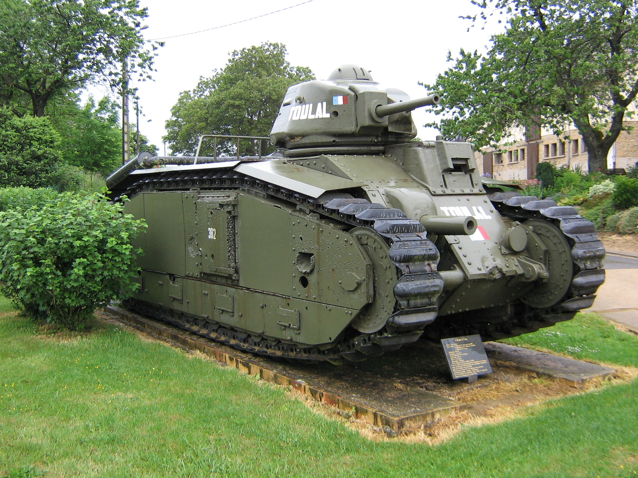 Char B1 bis at Stonne, France. Le TOULAL appartenait a la 3e compagnie, 49e BCC, 3e division cuirassée. Anciennement MERRY-BELLOY, il fut détruit à Stonne le 14 mai 1940. Son équipage était le suivant : Chef de char : Lieutenant Caravéo Pilote : Adjudant-Chef Henri Lefevre Radio : Sergent Pierre Butel Aide-Pilote : Caporal-chef René Chomette